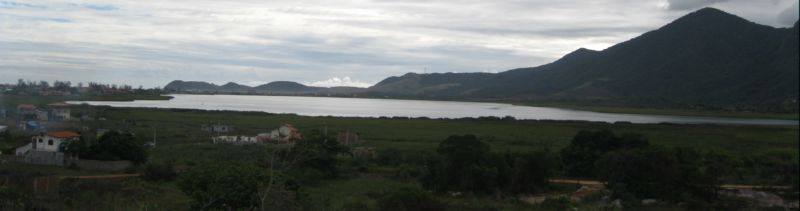 Montanhas e Lagoa de Jaconé